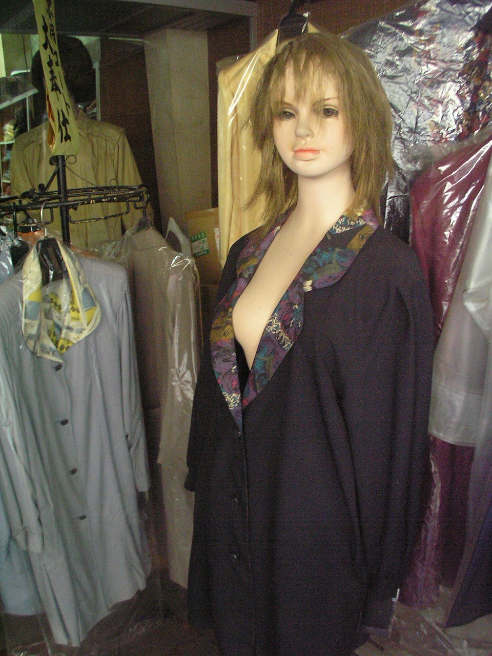 マネキン三木なめら商店街